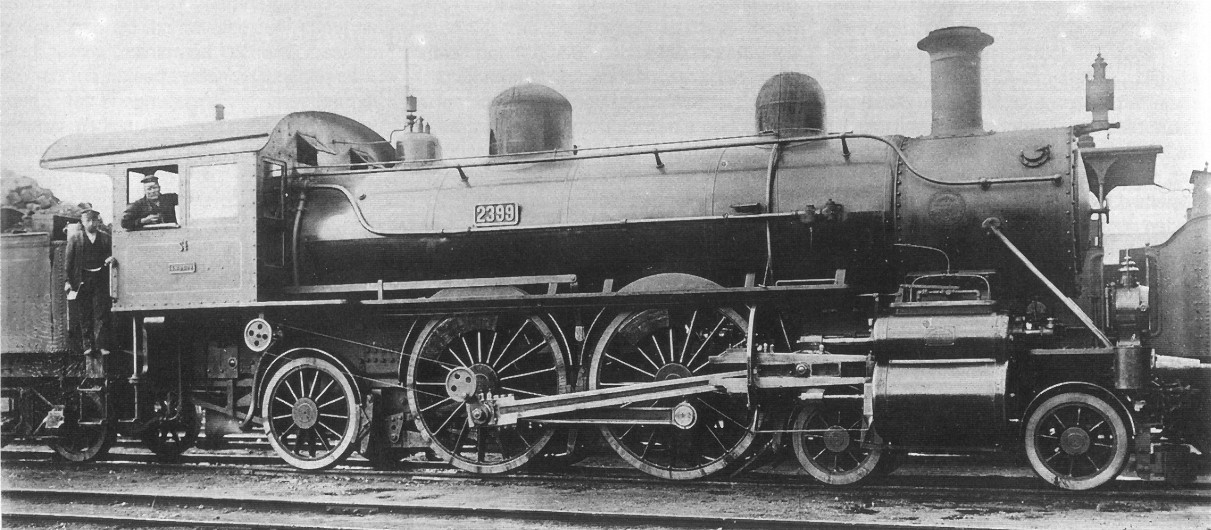 Dampflokomotive Bayerische S 2/5.